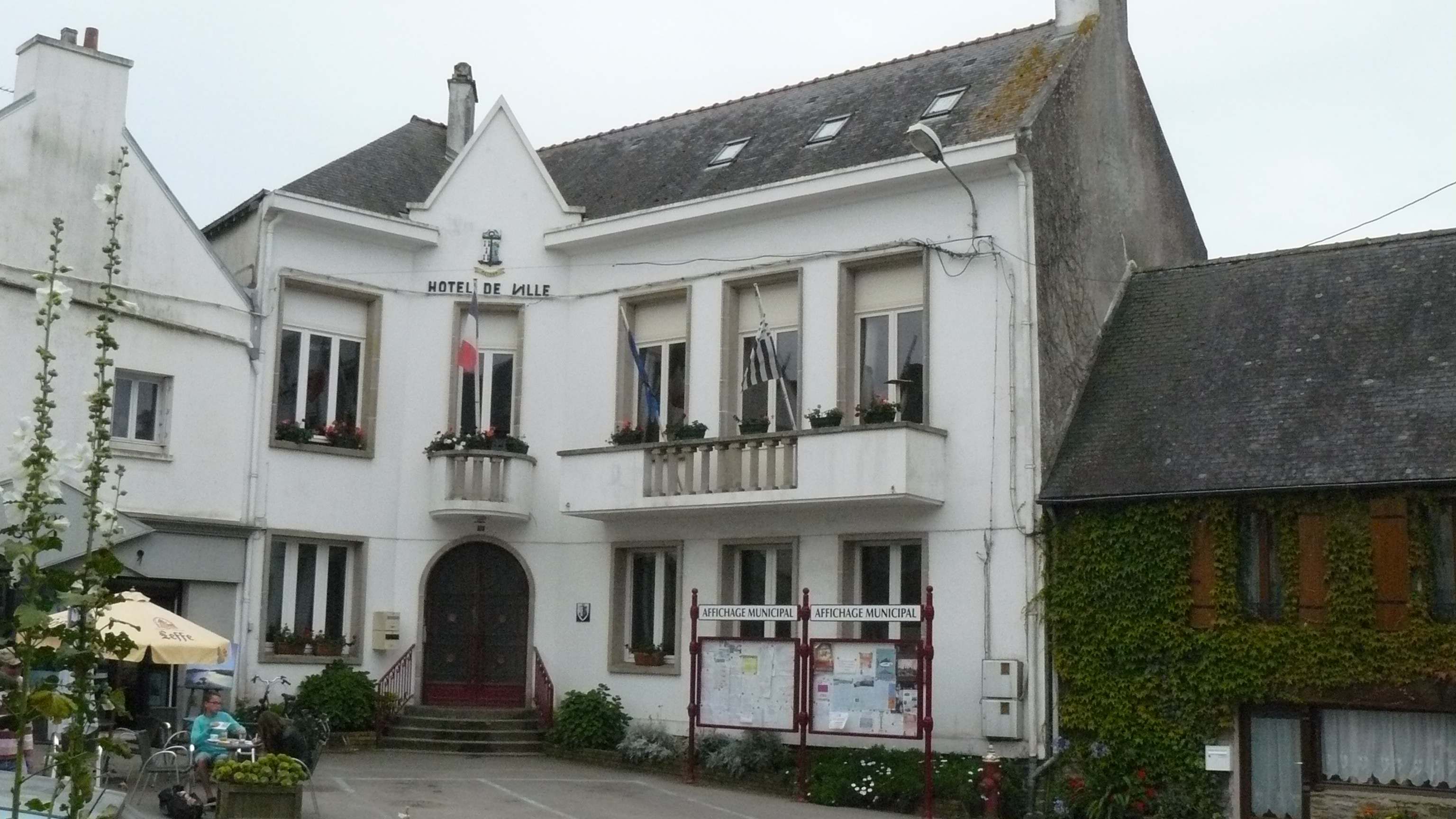 Photo de la mairie de l'ïle de Groix.